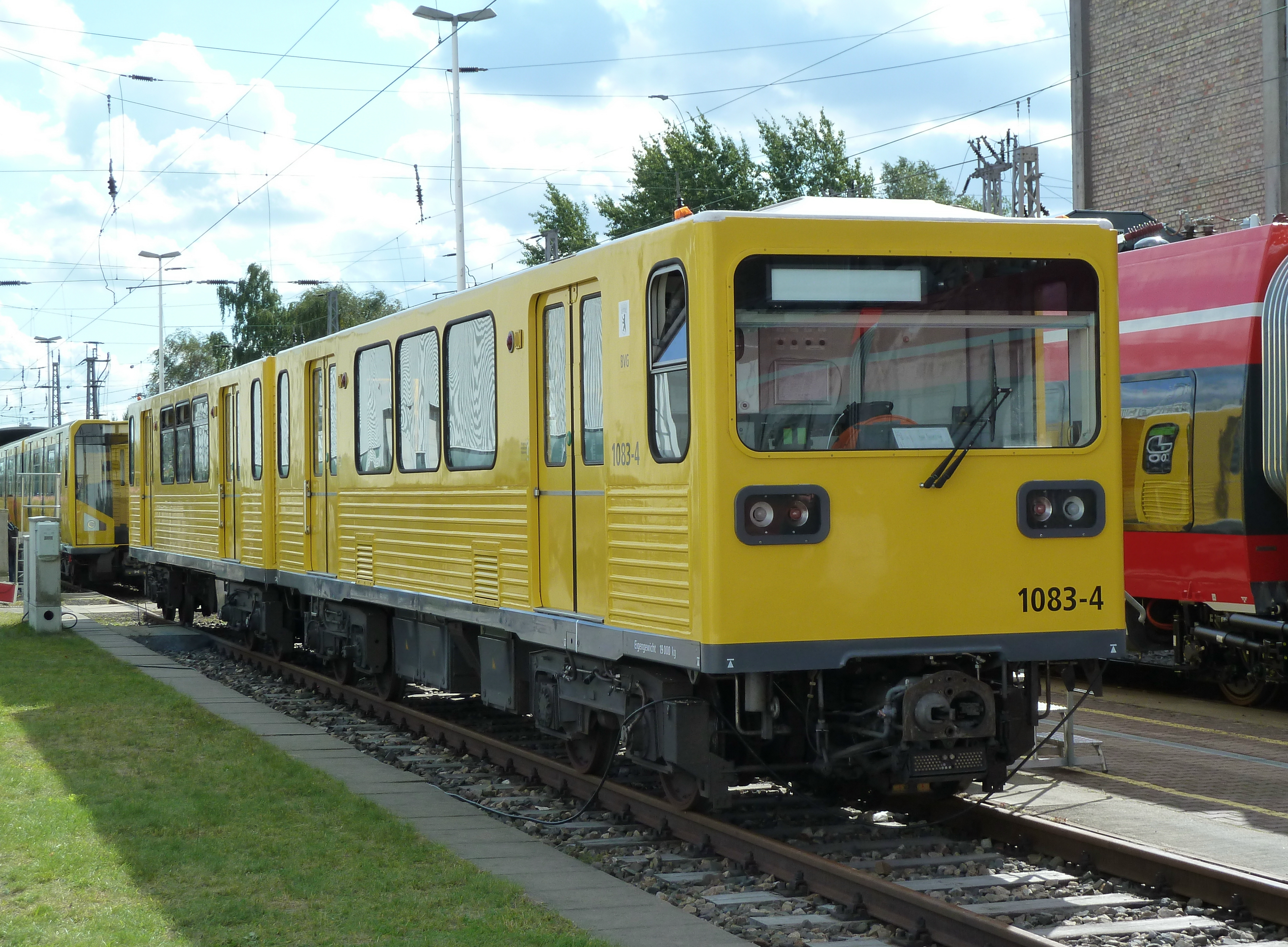 Ertüchtigter Triebzug der Bauart G im Bombadier-Werk in Hennigsdorf am 19. September 2010